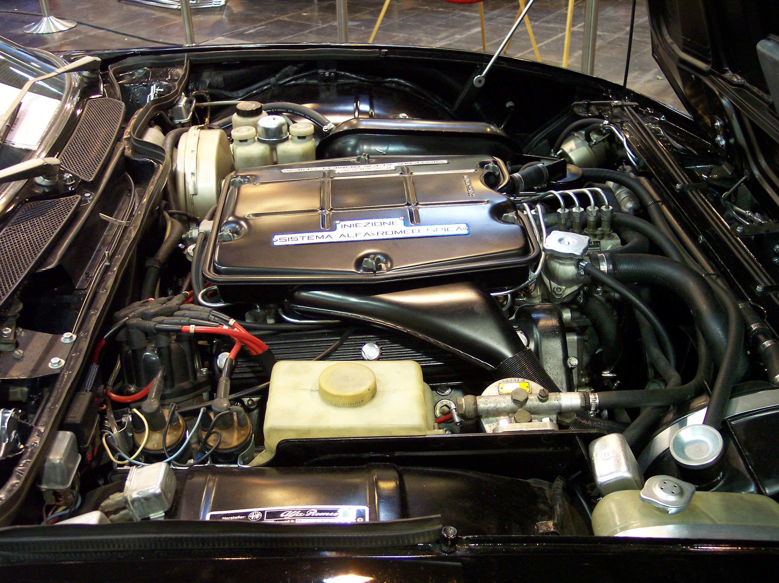 Alfa Romeo Montreal engine